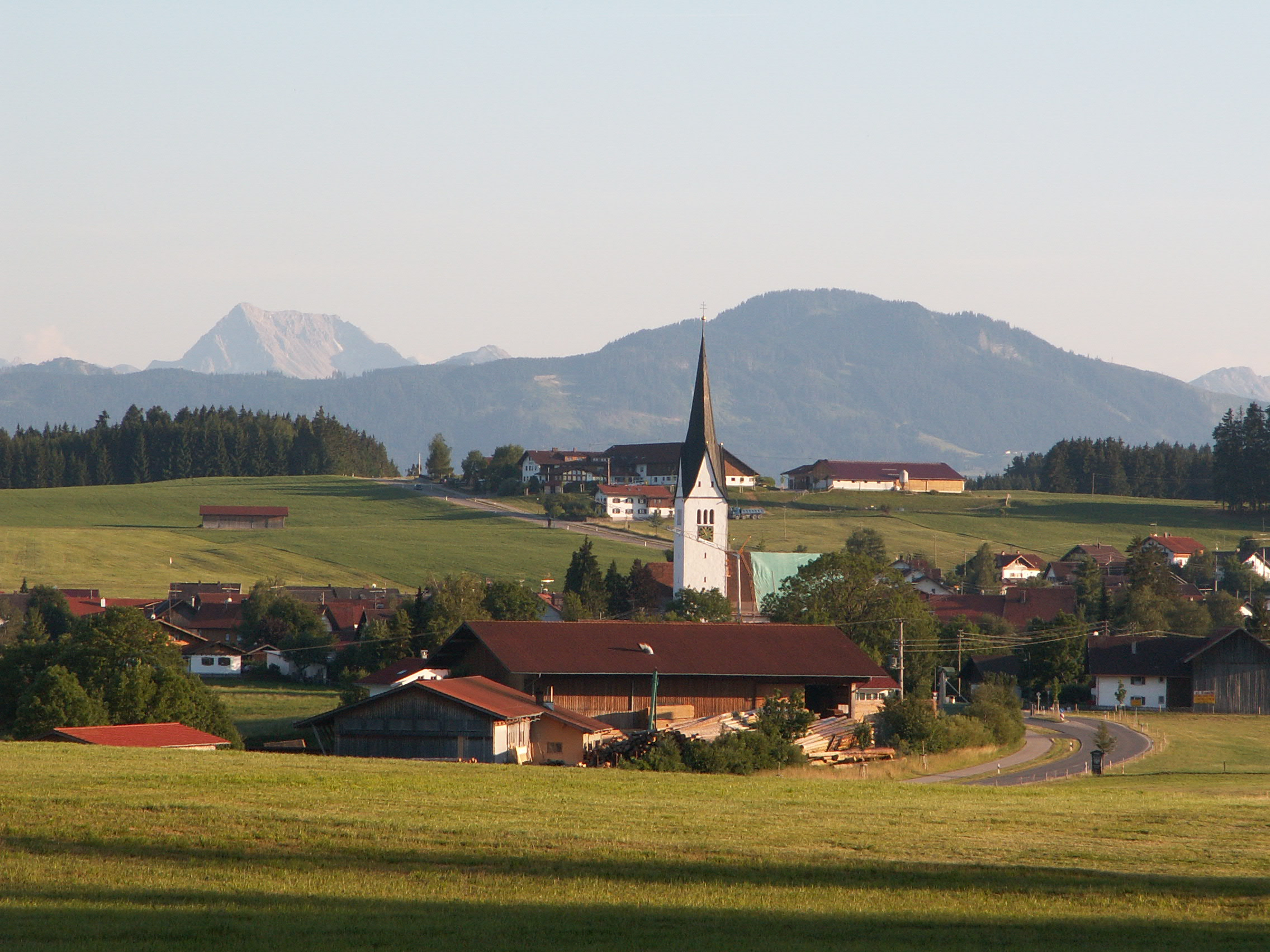 Wald im Ostallgäu im Juli 2006